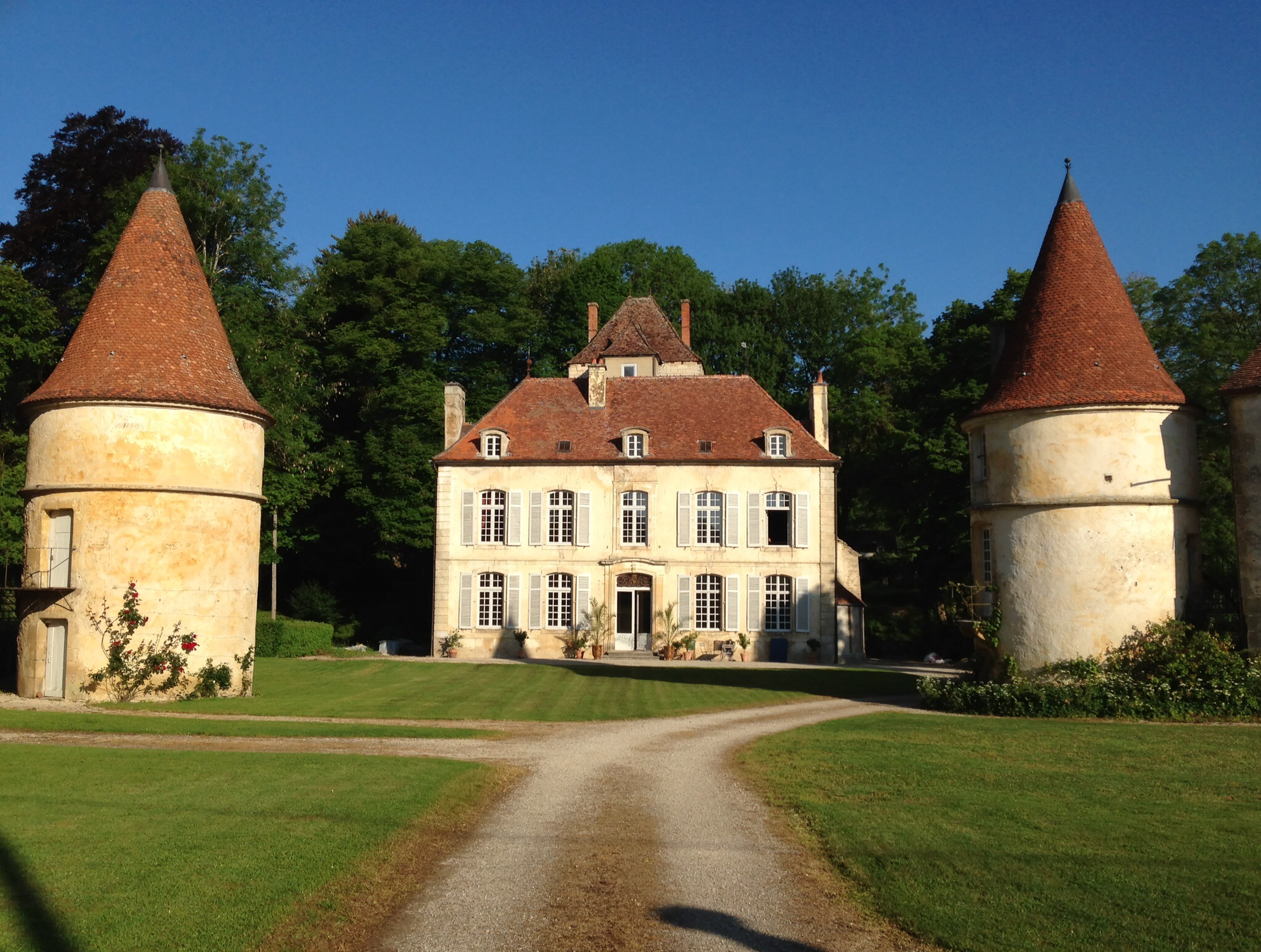 Château de Quemigny-sur-Seine